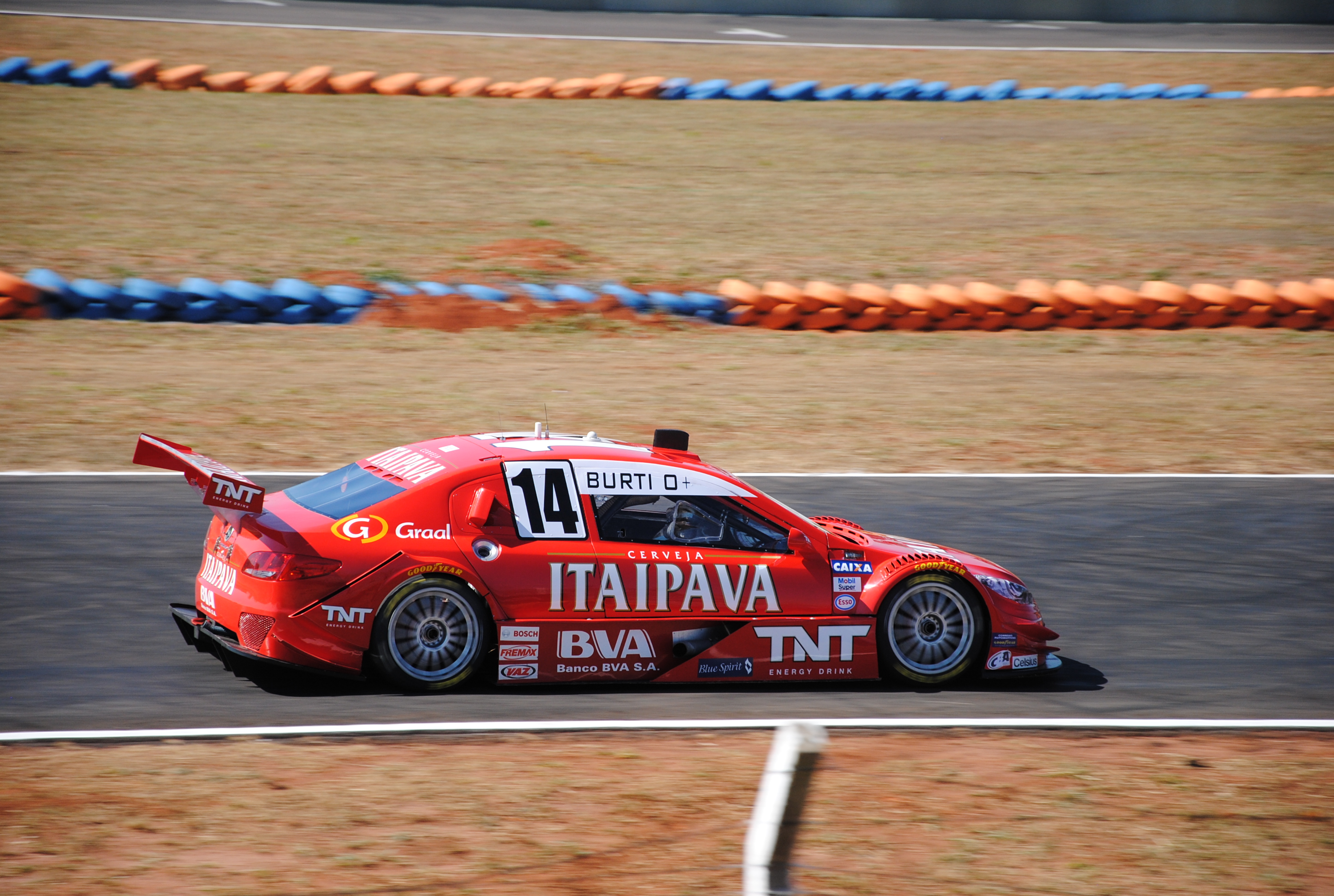 Stock Car Brasil series. Autódromo de Campo Grande, MS.